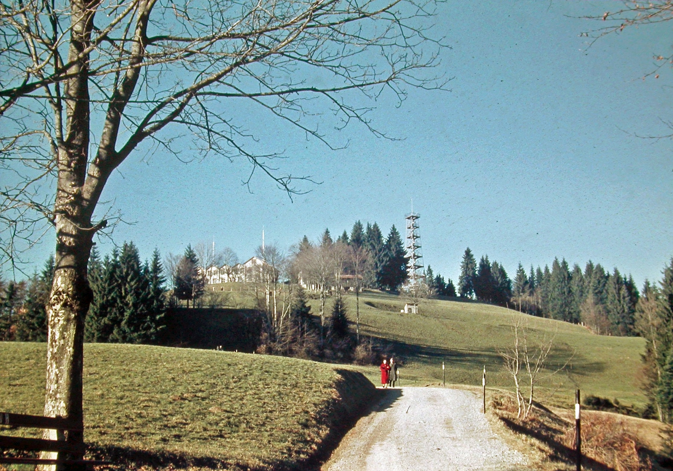 Bachtel mit dem alten Turm, dem heutigen Turm bei der Hochwacht auf dem Pfannenstiel